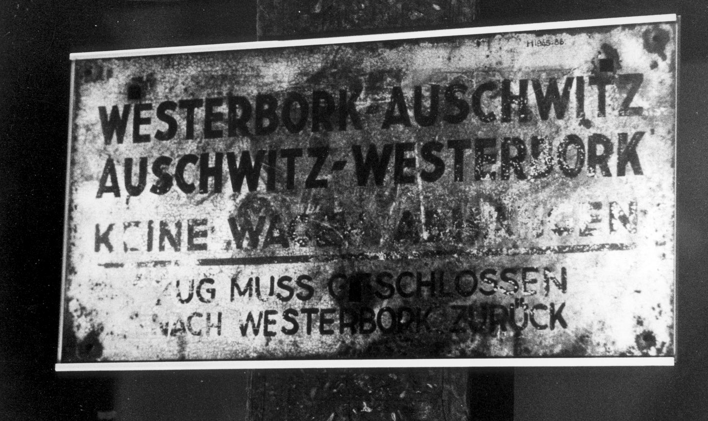 Bord bij vertrekpunt trein Westerbork.